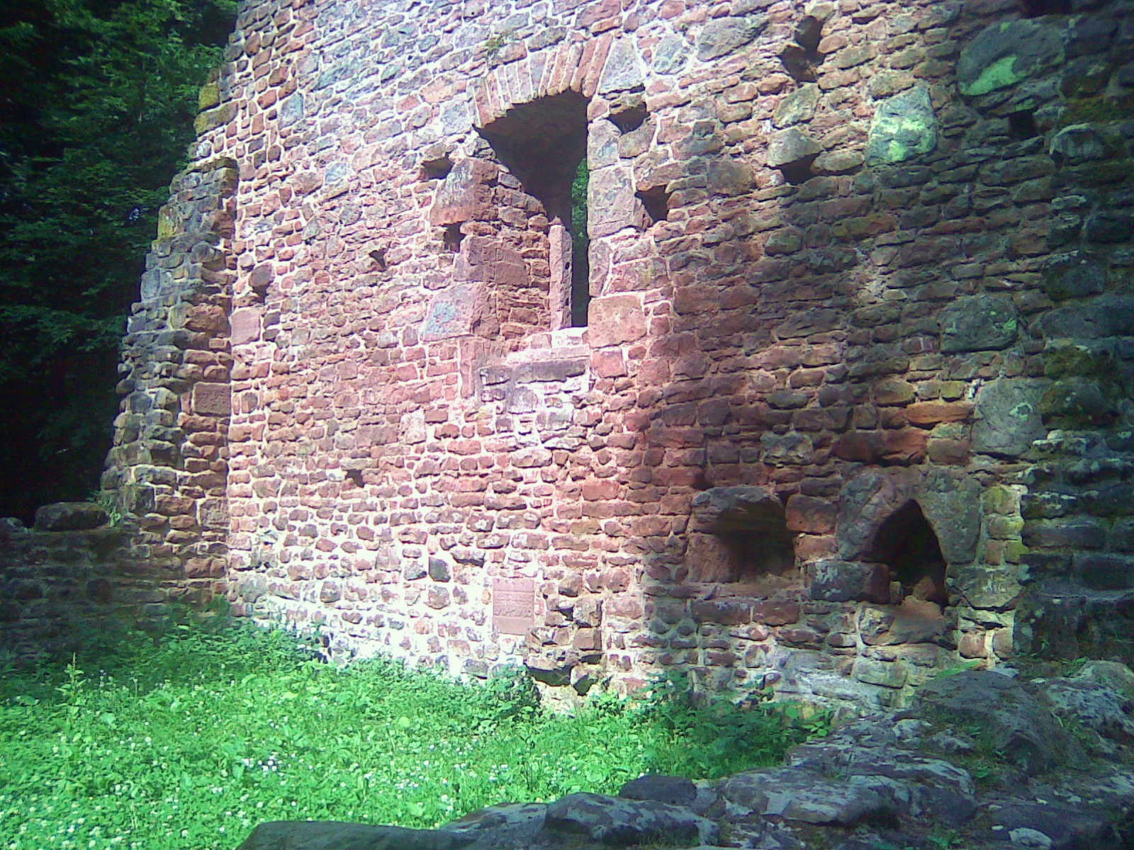 Innenraum der Kirchruine Leisenberg. Auf der rechten Seite ist ein Taufbecken zu erkennen.